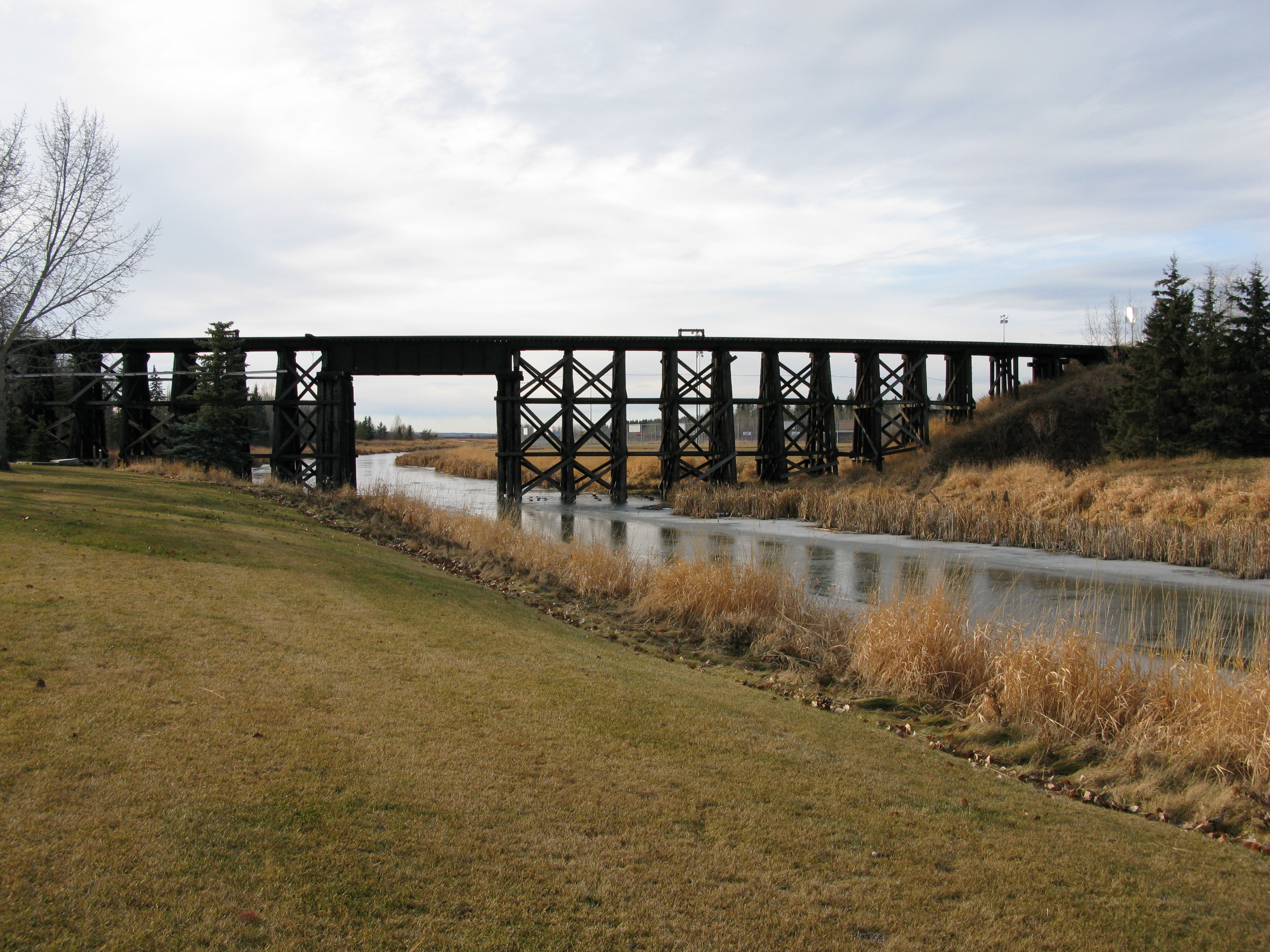 Sturgeonriverstalbert